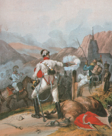 österreichisch-ungarisches 6. Chevaulegers-Regiment Mitte des 19. jahrhunderts